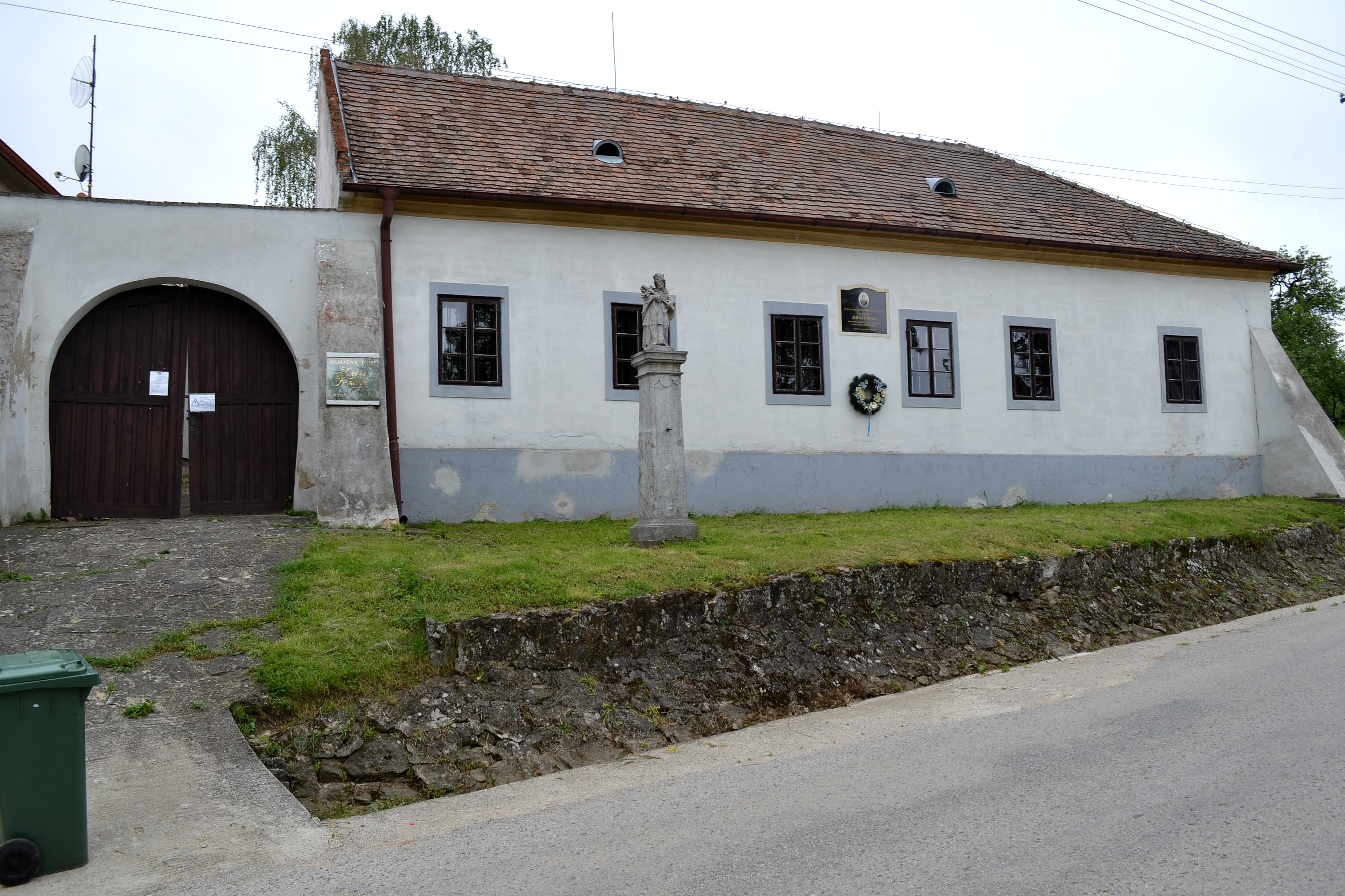 Pamätný dom Juraja Fándlyho v budove bývalej rimskokatolíckej fary. Významný slovenský spisovateľ pôsobil v rokoch 1780 - 1807 v Naháči ako farár. Pamätný dom bol zriadený v roku 1990